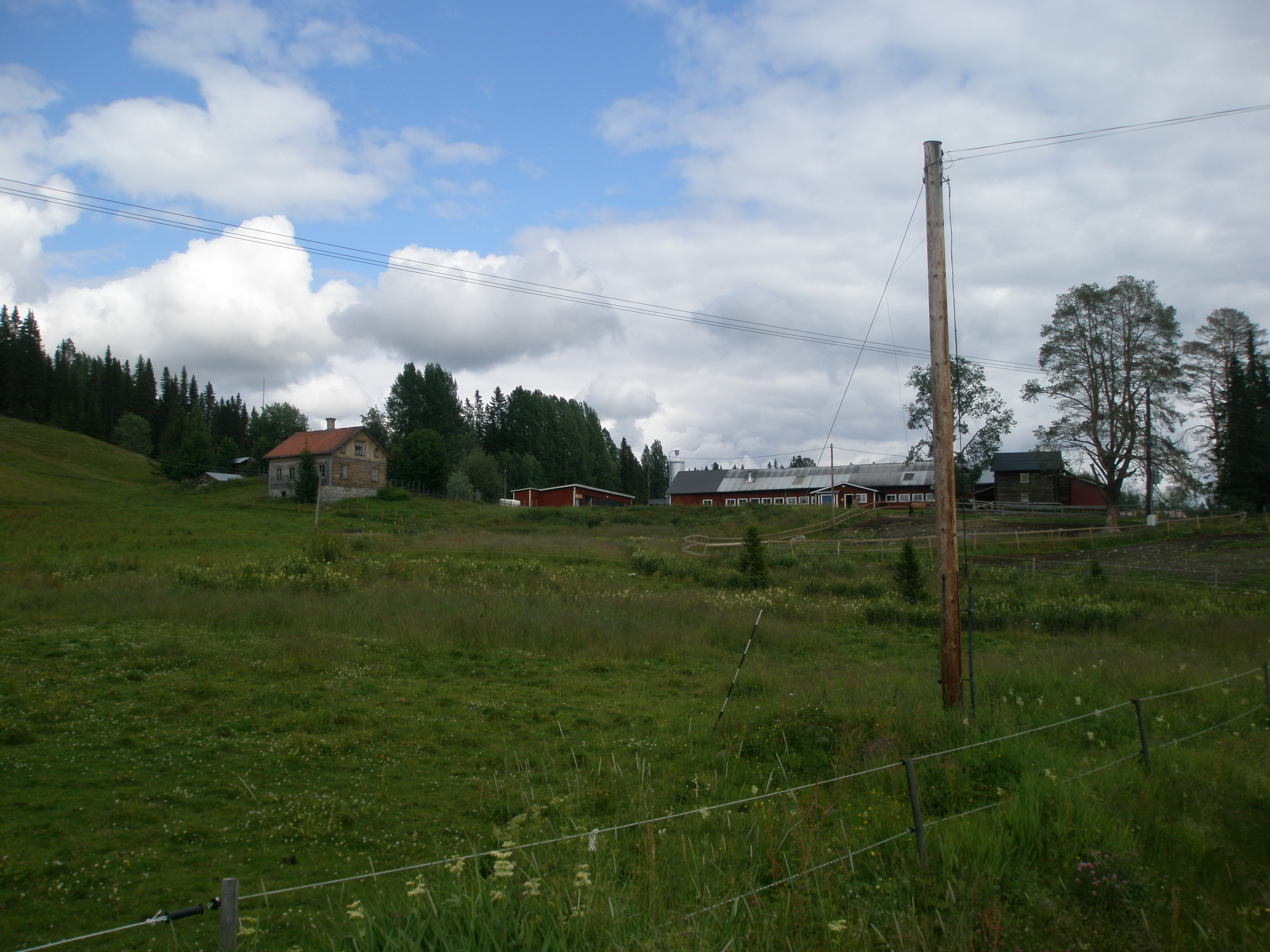 Vejmon, Offerdals socken, Krokoms kommun, Jämtland, Sverige.